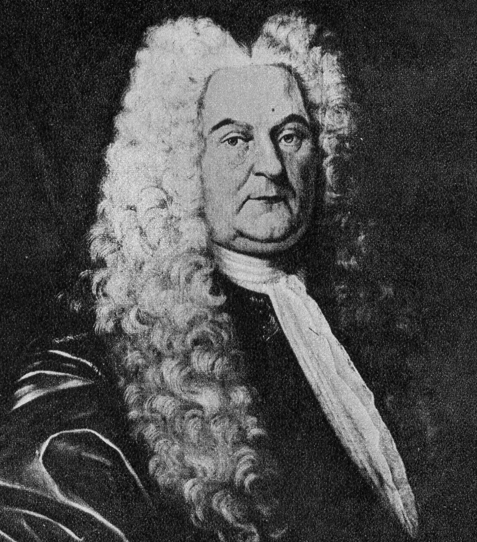 Johan Rudberus, adlad Cederbielke